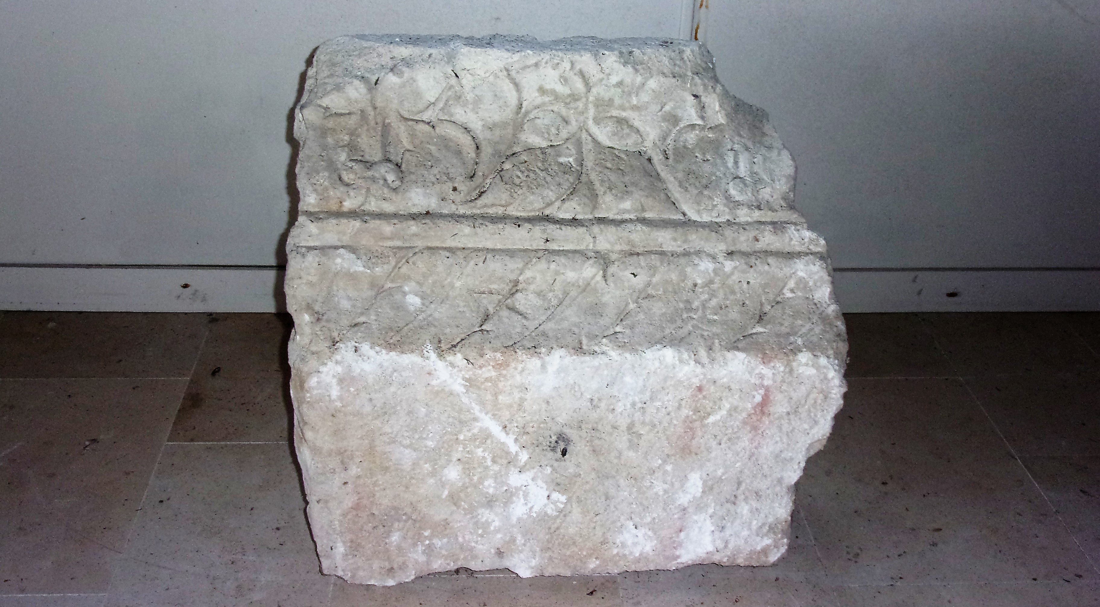 Potentiel fragment de corniche du pilier d'Yzeures